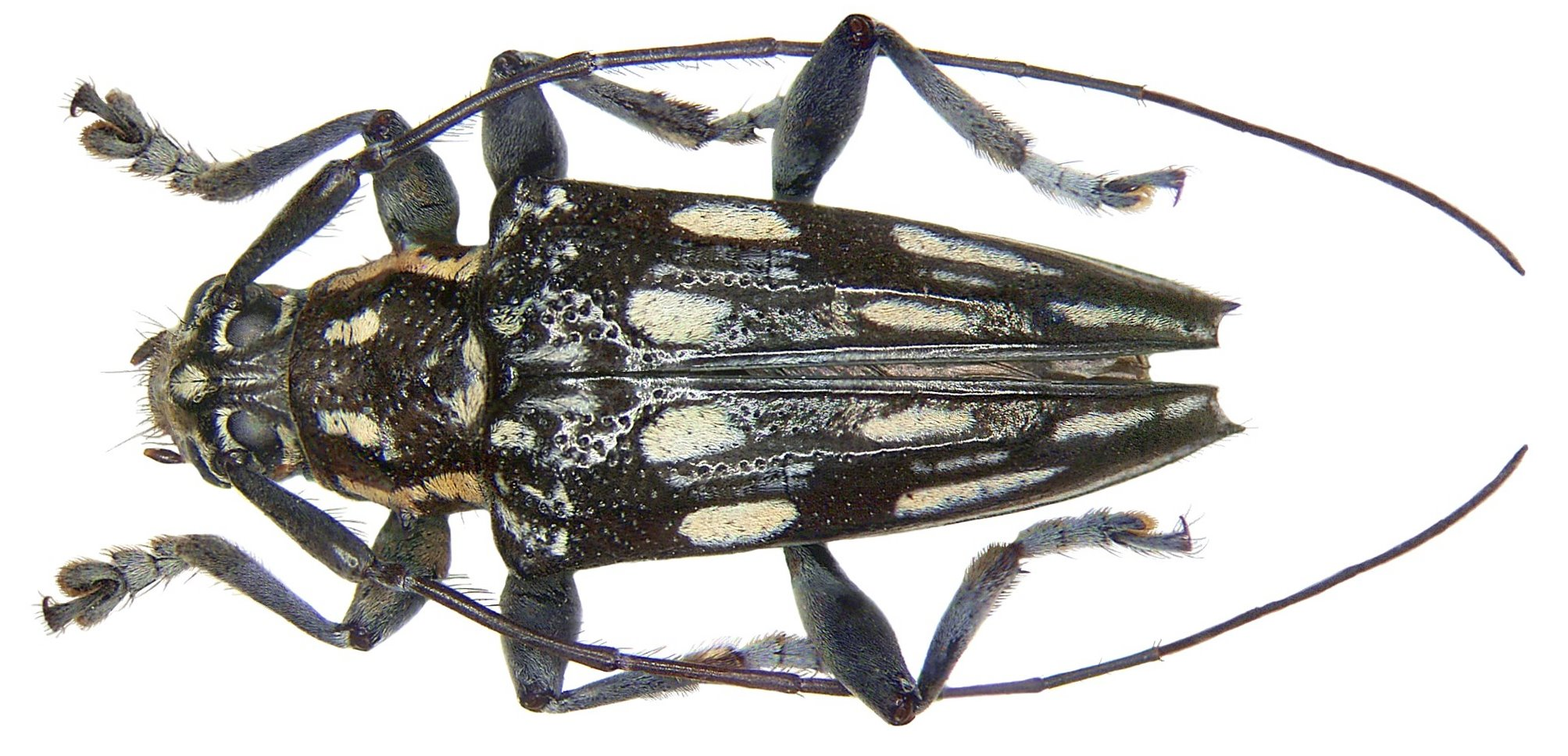 Familie: Cerambycidae Grösse: 14 mm Fundort: Indonesien, Papua Neuguinea, Woodlark Isl. Type, Coll. Museum Paris Foto: U.Schmidt, 2007